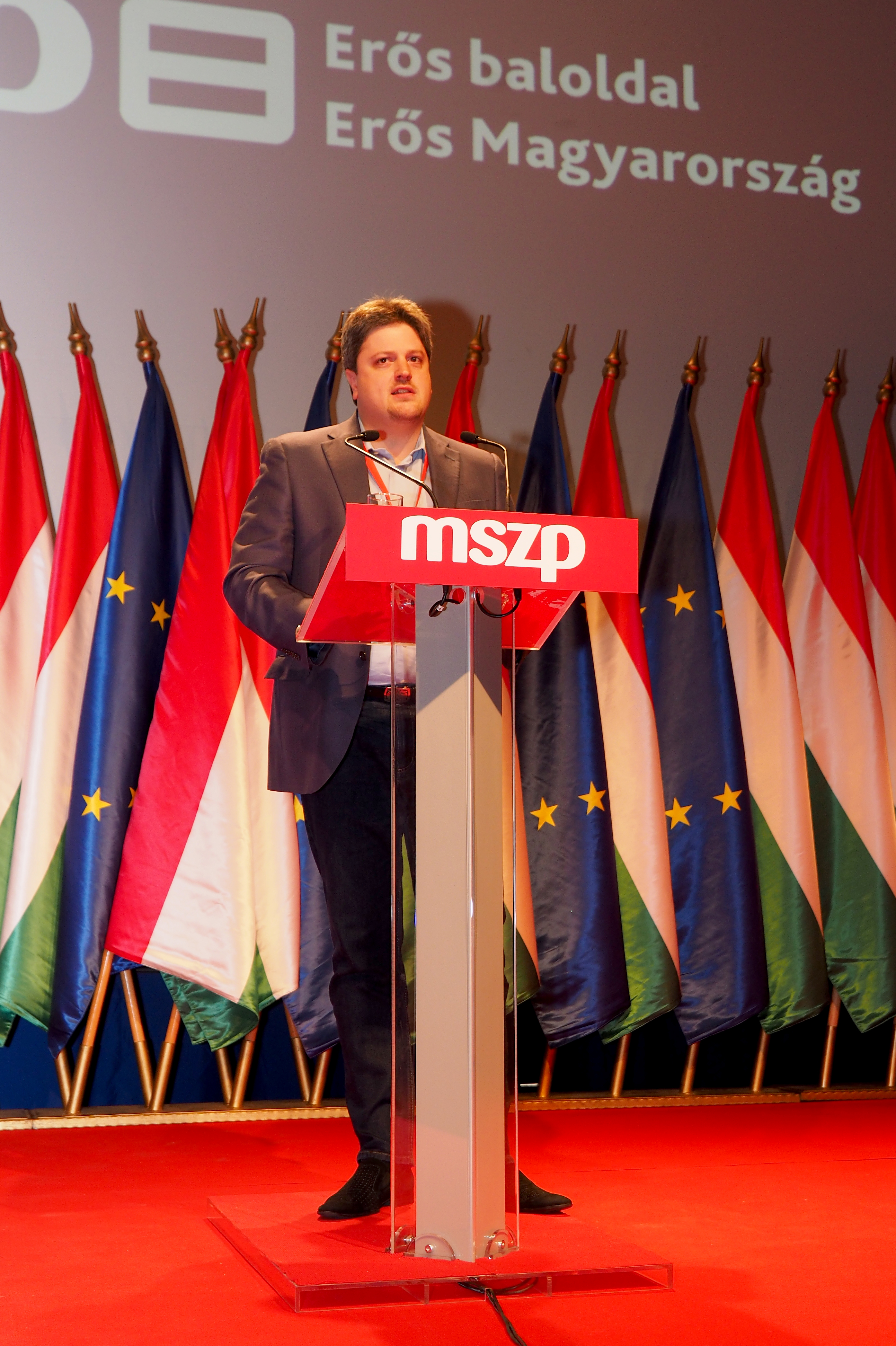 MSZP 2014. júliusi kongresszusa. Bárándy Gergely